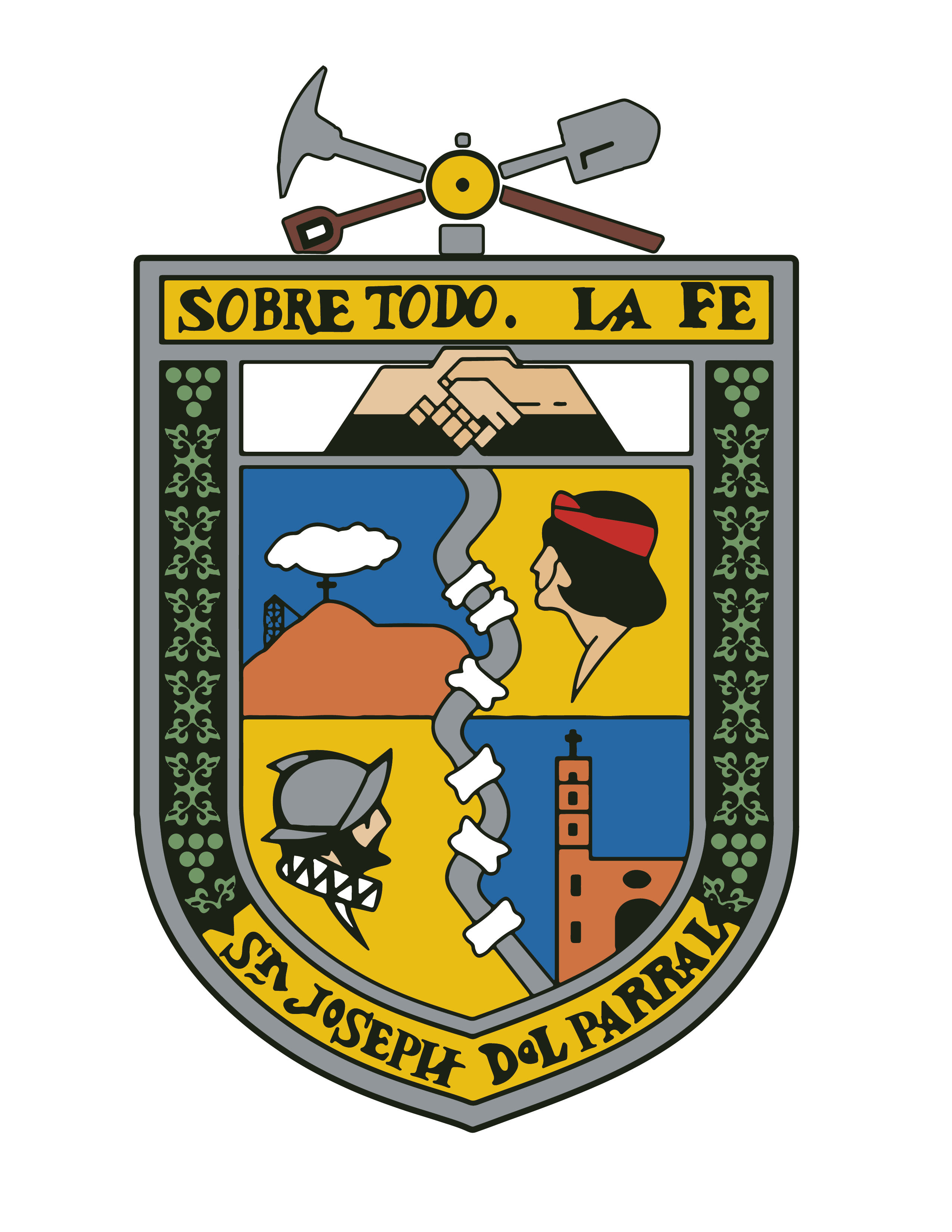 Escudo de Hidalgo del Parral Chihuahua México